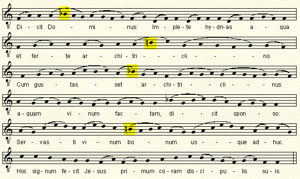 Коммунио (причастный антифон) Dicit Dominus